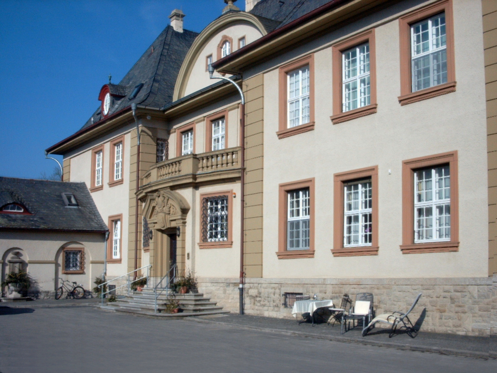 Die naturkundliche Klinik im Schloss Gelchsheim